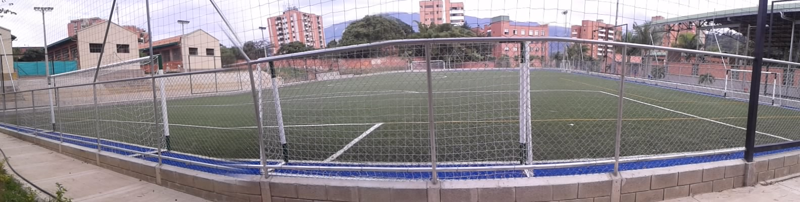 Cancha sintetica del ITIPB